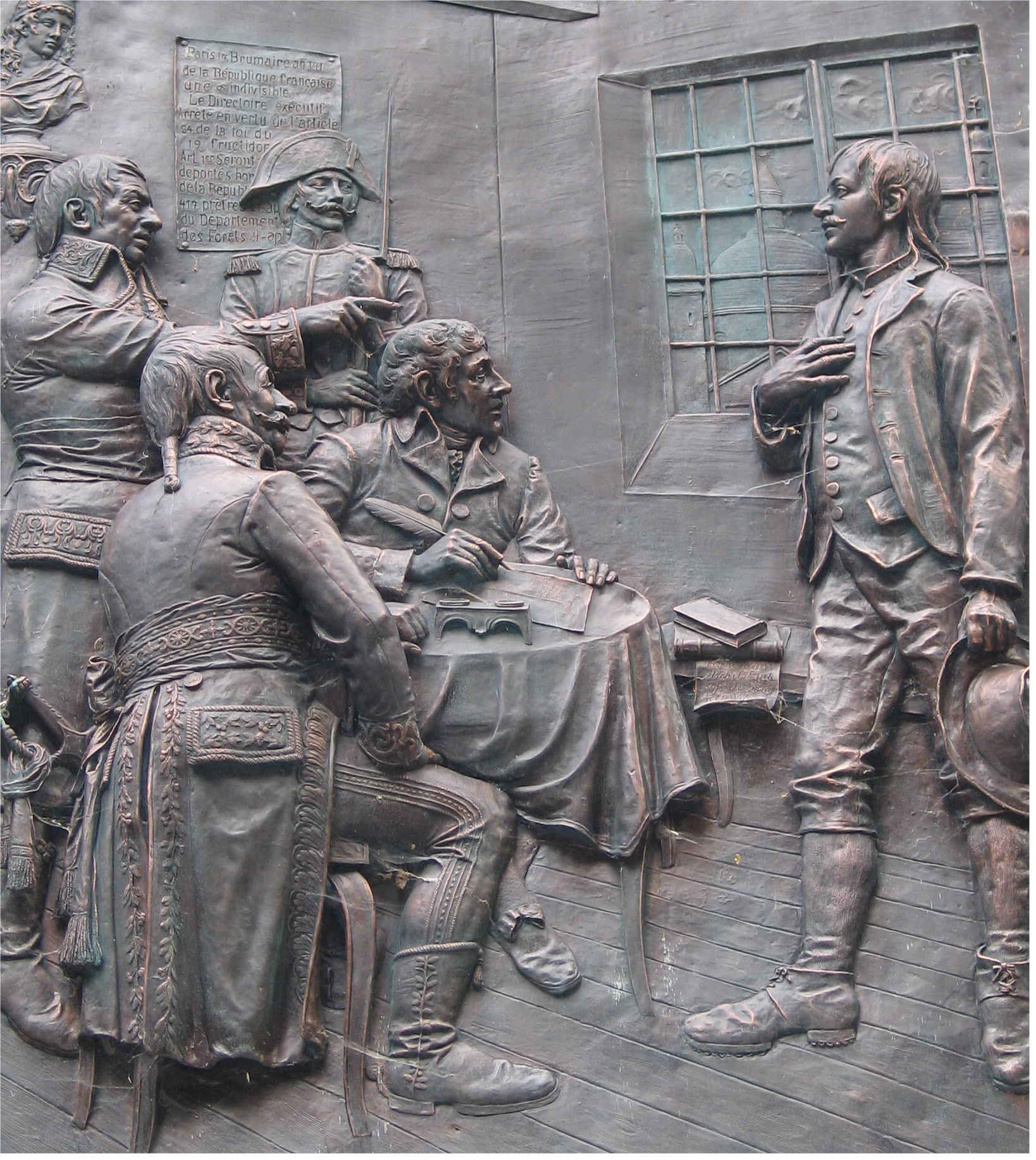 Détail vum Monument zu Klierf. Kategorie:Gemeng Klierf